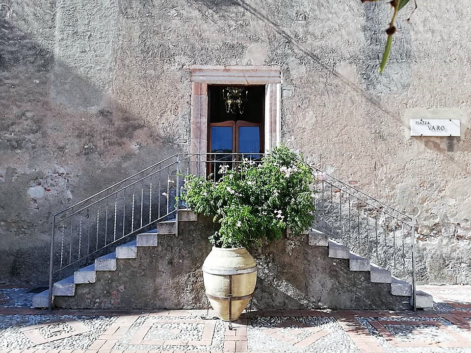 Entrata laterale destra.